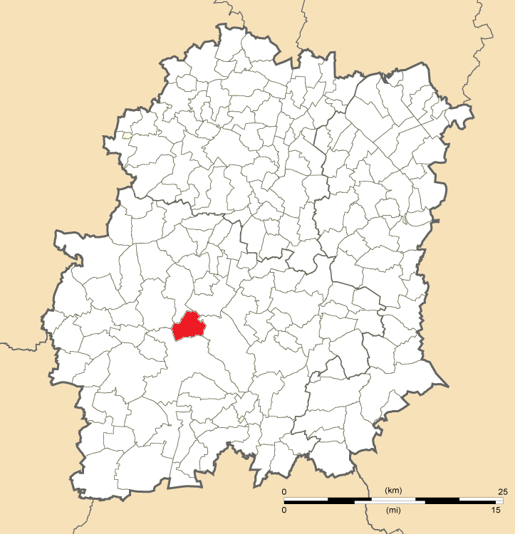 Carte de position de Brières-les-Scellés en Essonne (91)